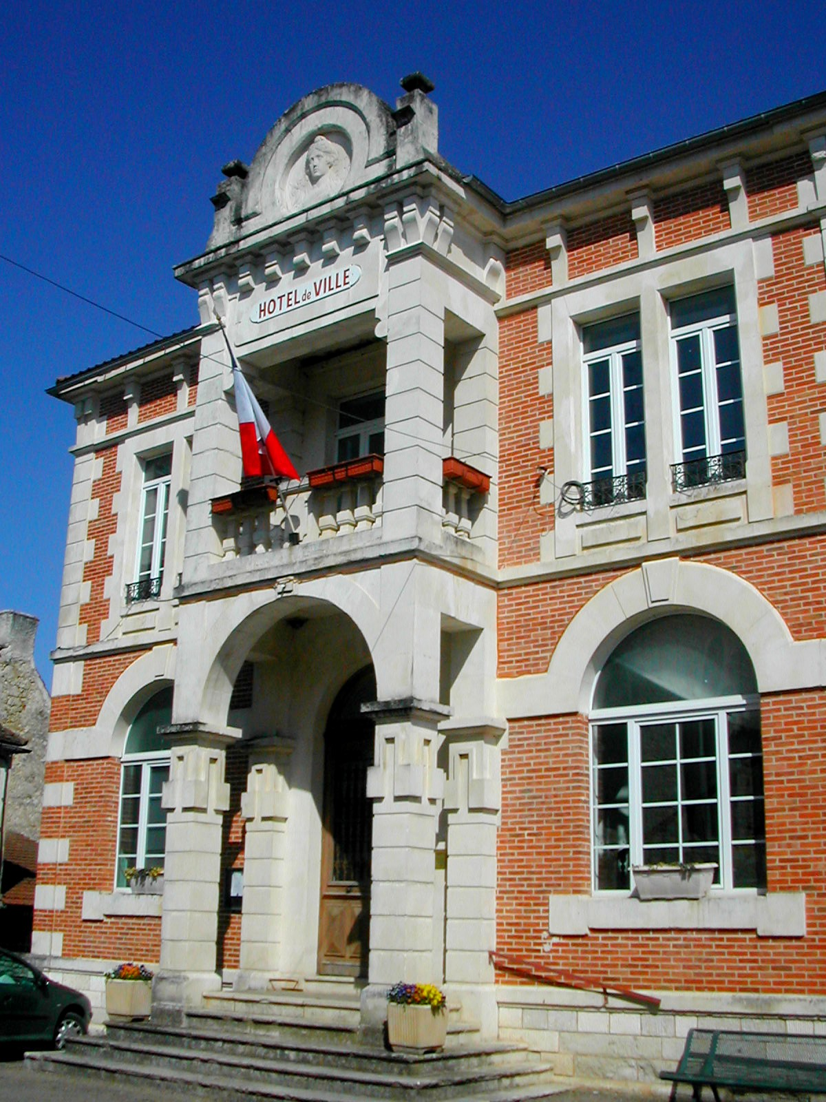 Marie datant de 1911 (Payrac)